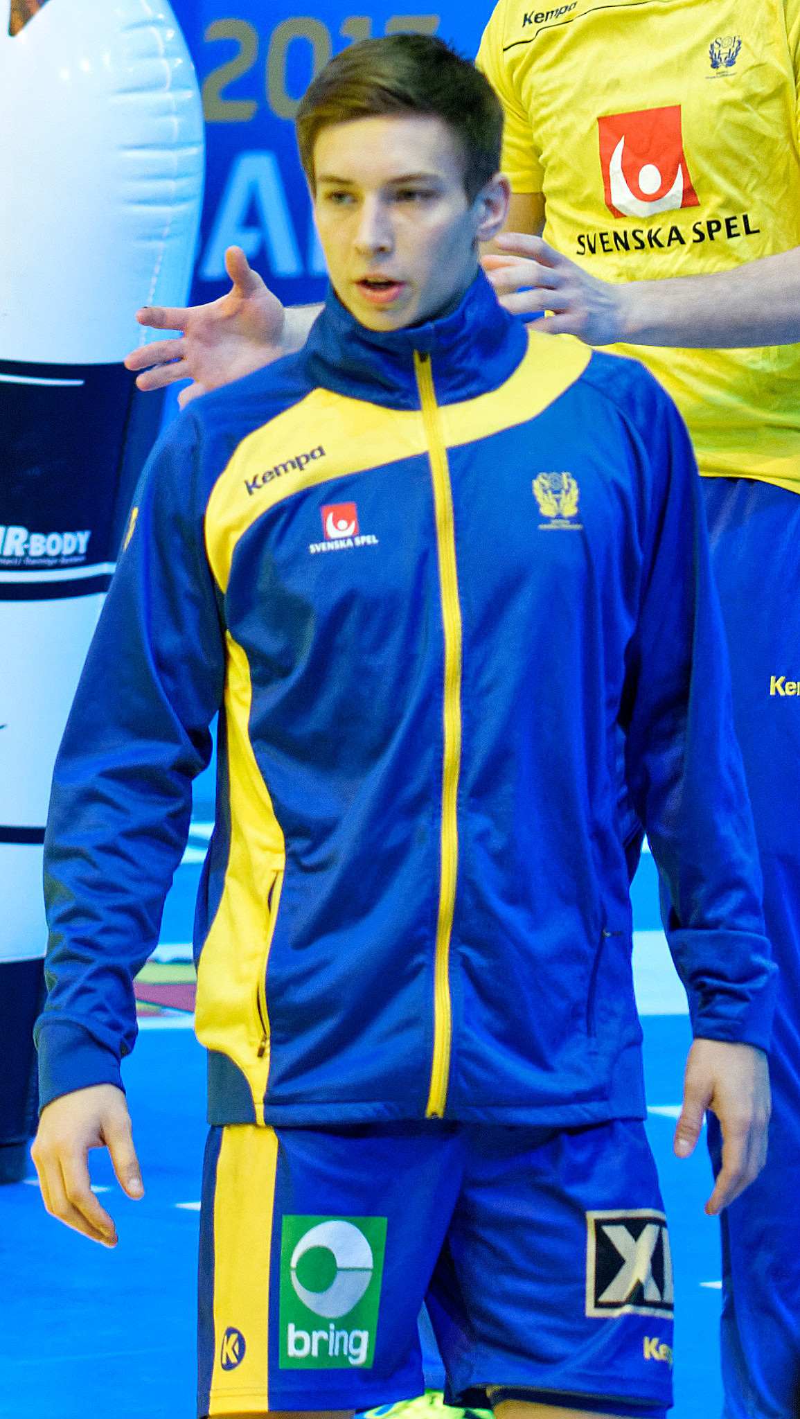 Match de la phase préliminaire du championnat du monde masculin de handball 2017 entre la Suède et le Danemark (Groupe D). A Bercy, le 16 janvier 2017.